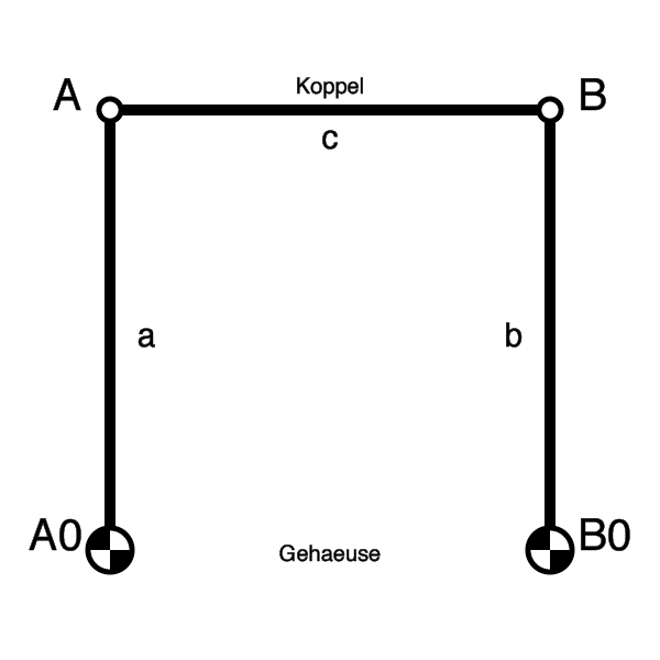 Viergelenk